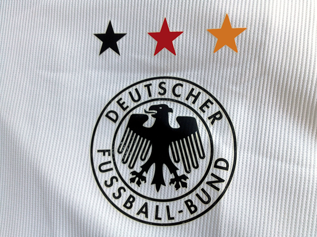 德国国家足球队球衣上带有冠军星章的队徽。